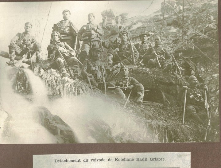 IMRO cheta ot Grigor Hadzhikimov